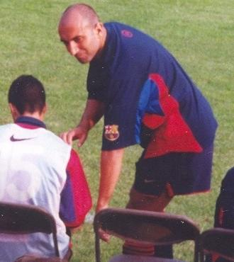 Abelardo Fernández als voetballer van FC Barcelona (juli 2000)